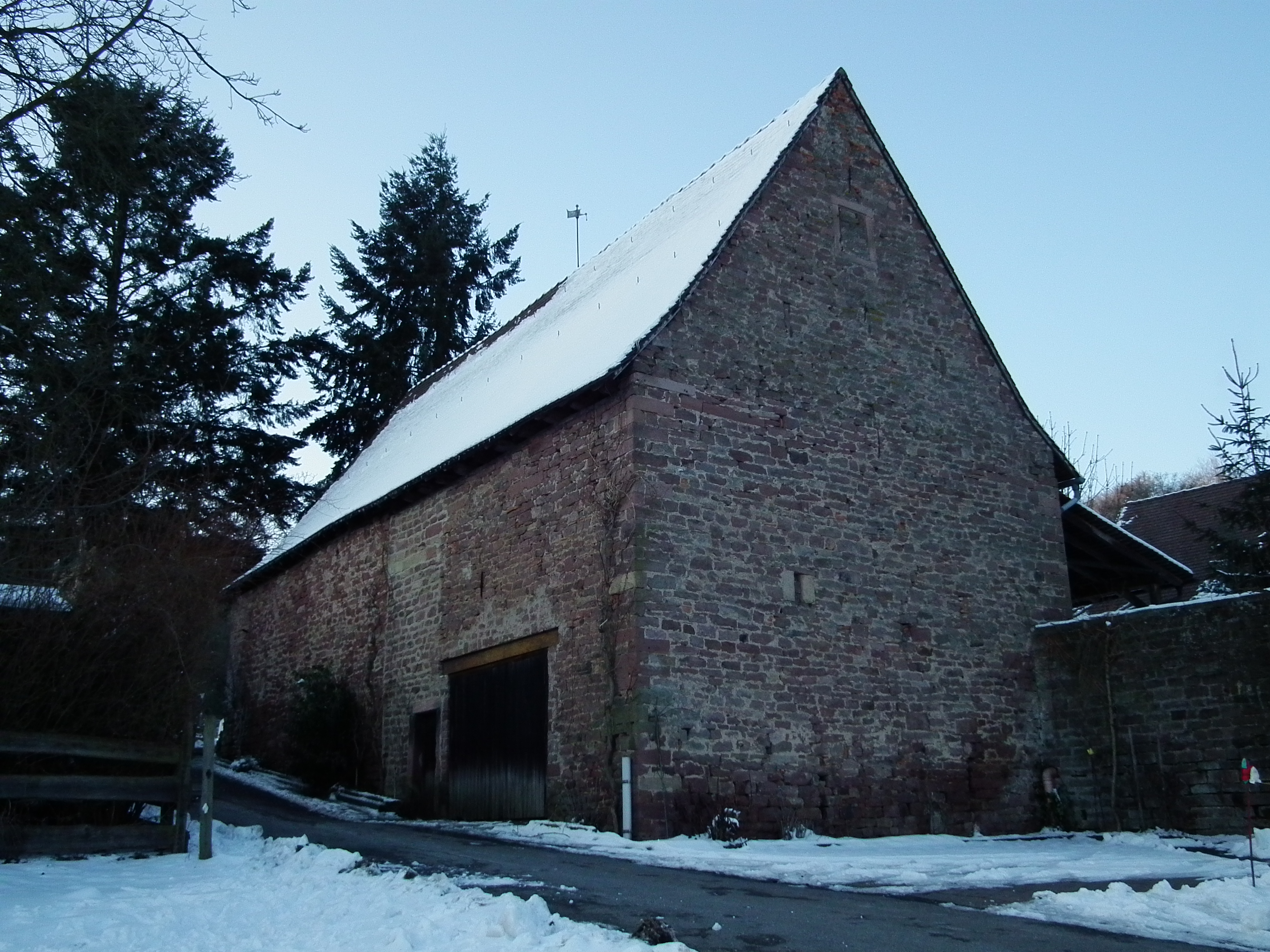 Scheune aus dem Jahr 1798 auf dem Heidelberger Kohlhof (Baden-Württemberg, Deutschland)